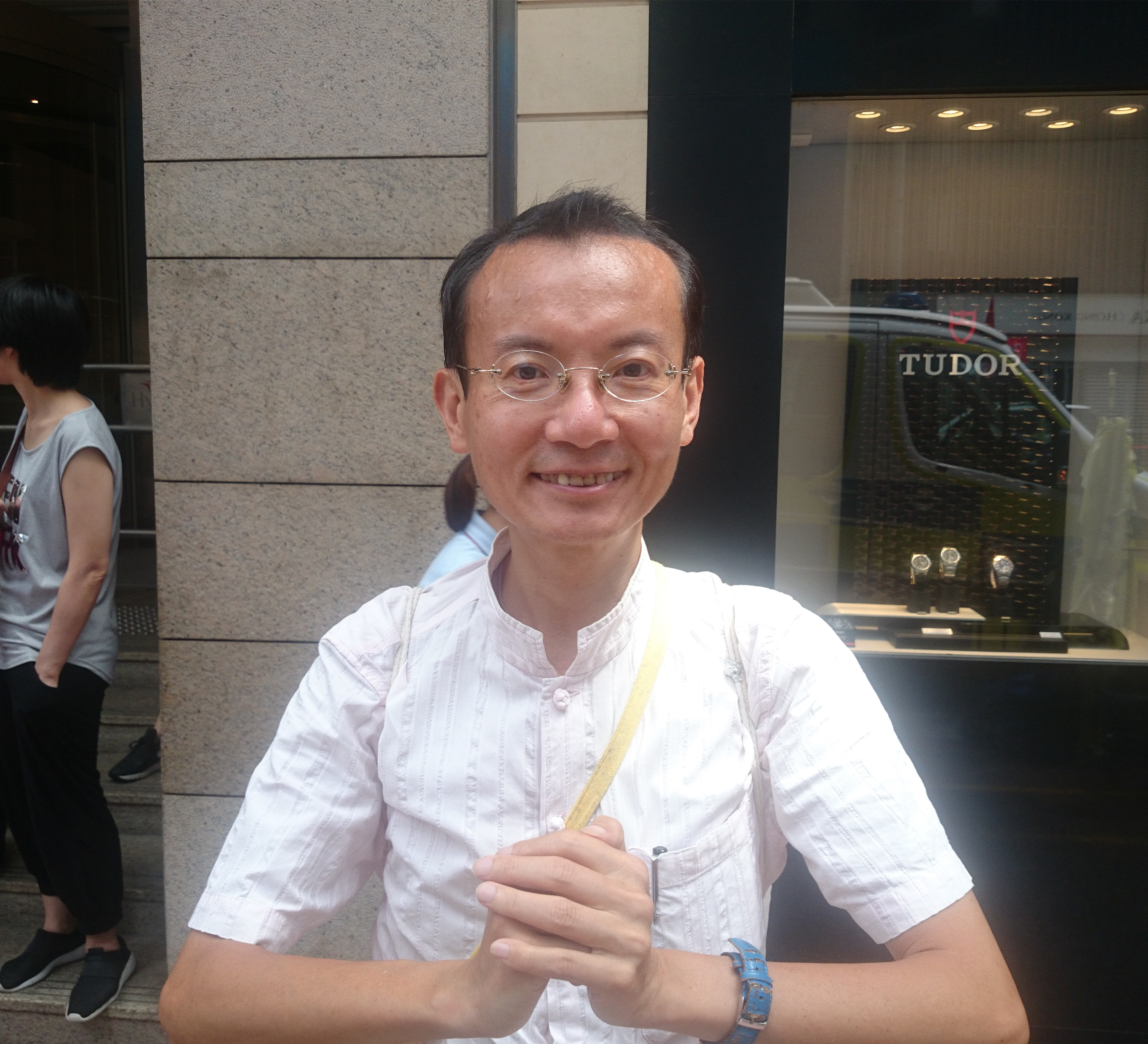 粵語: 開埠177年7月1號，曾焯文喺希愼廣場個門口度。